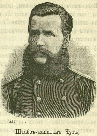 Щабс-капитан Александър Чут, командир на 5-та рота от 18-ти Вологодски пехотен полк, убит на 3 юли 1877 г. при Никопол.